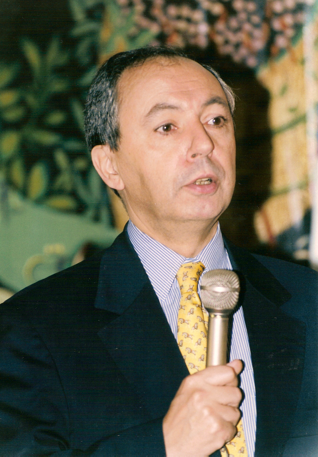 Bruno Mégret à Bordeaux